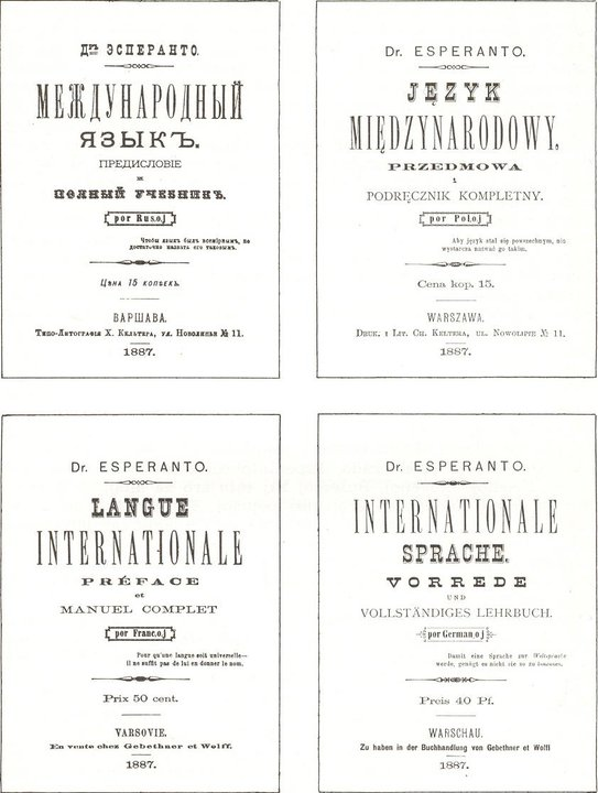 Skany stron tytułowych czterech pierwszych podręczników do nauki języka Esperanto wydane w 1887 roku